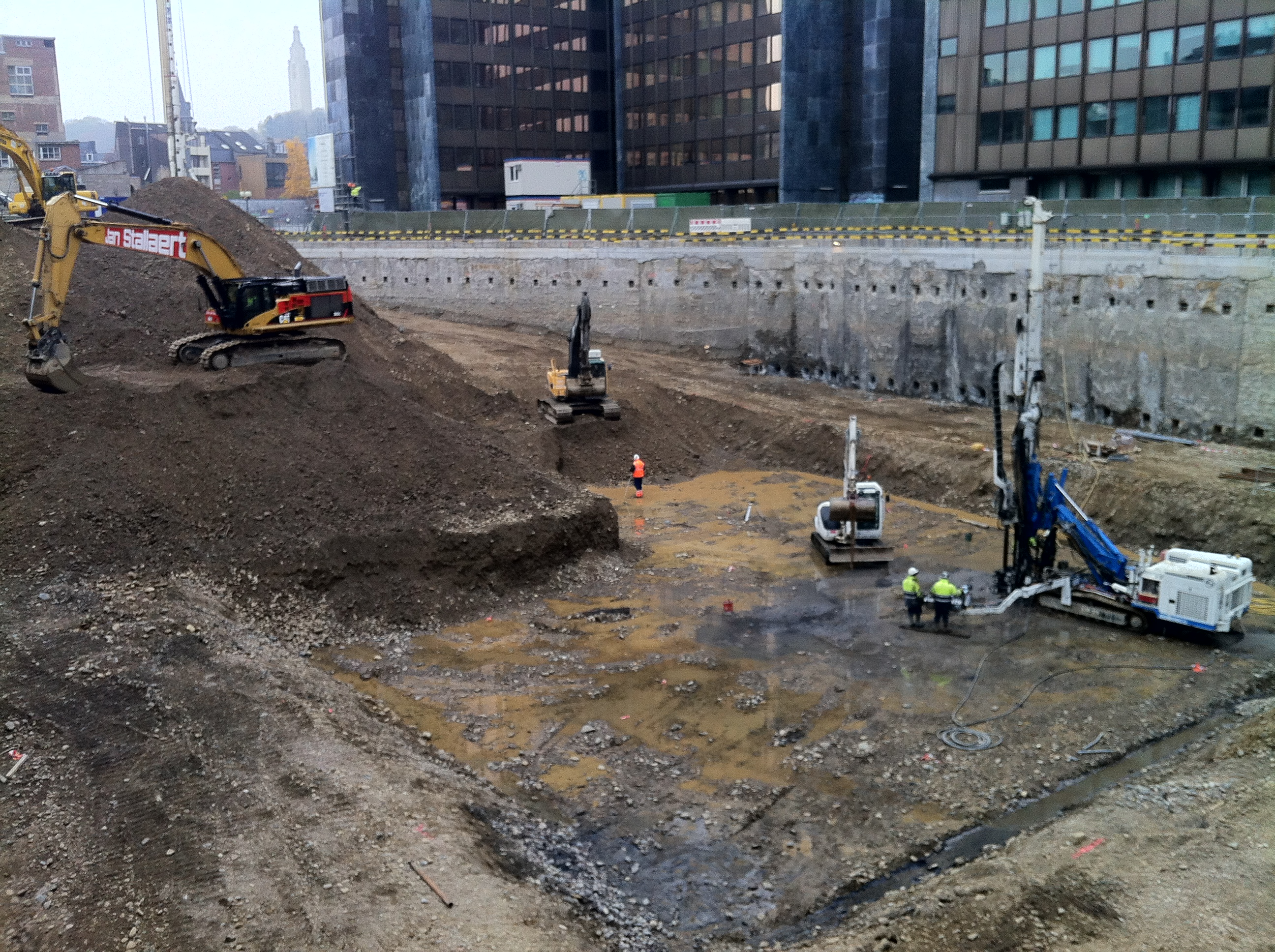 Travaux des fondations de la tour des finances